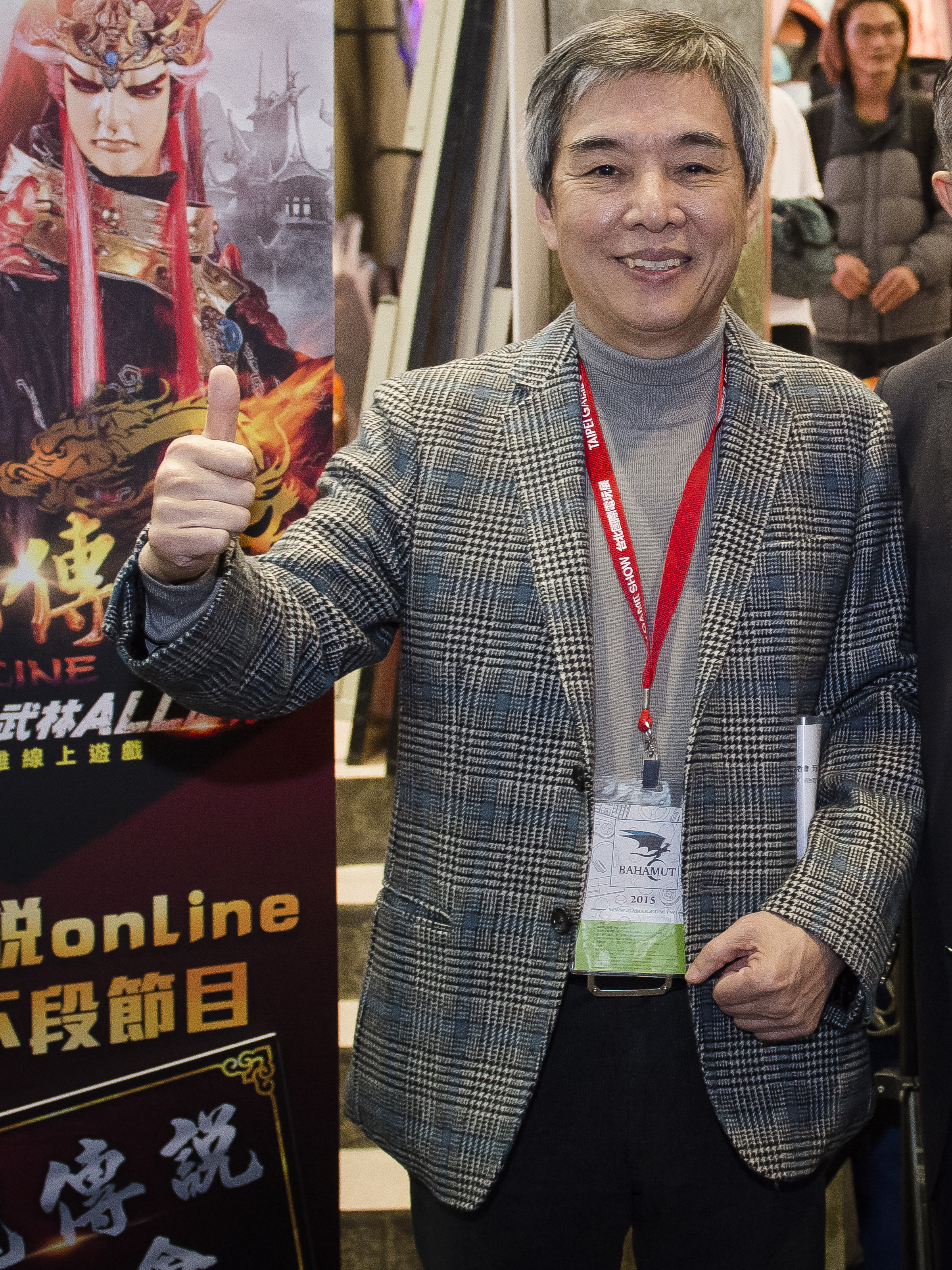 中文（台灣）: 2015台北國際電玩展，霹靂國際多媒體董事長黃強華出席智樂堂網路萬人線上遊戲《刀龍傳說Online》上市記者會。